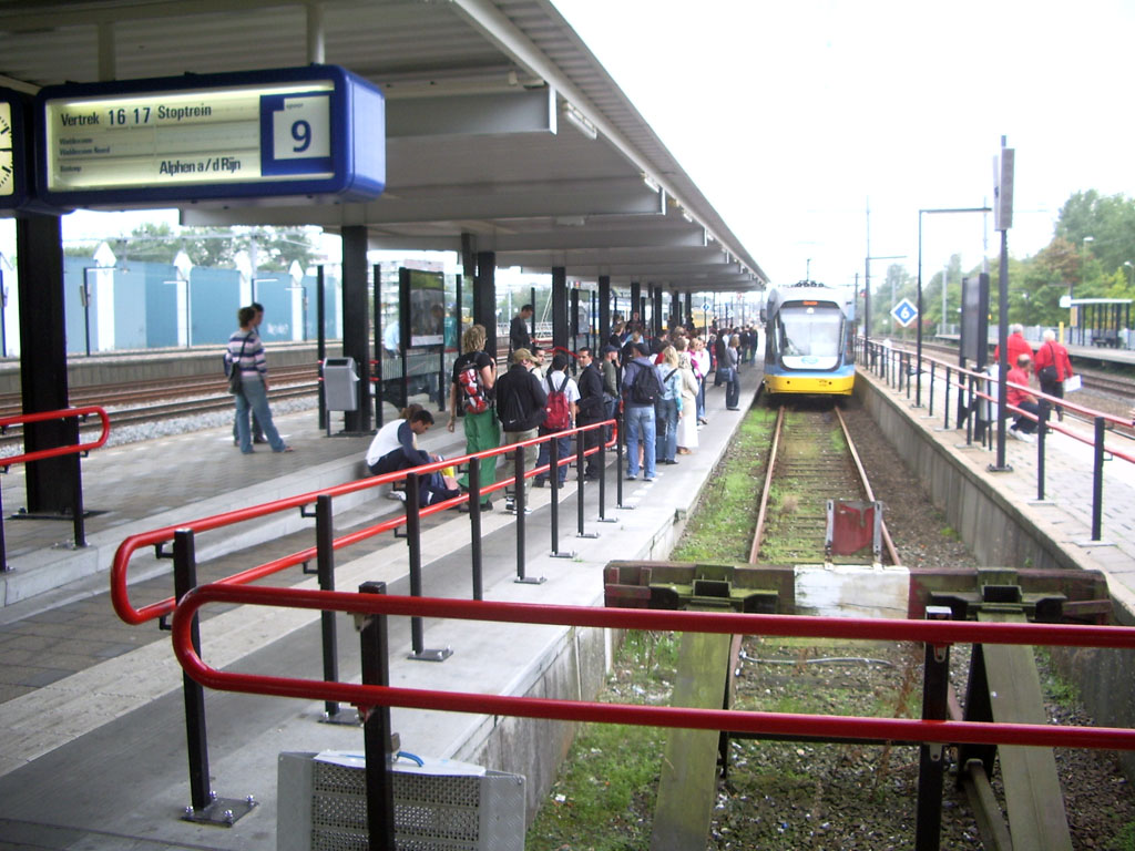 Het zakspoor (spoor 9) op station Gouda voor de trams naar Alphen aan de Rijn.